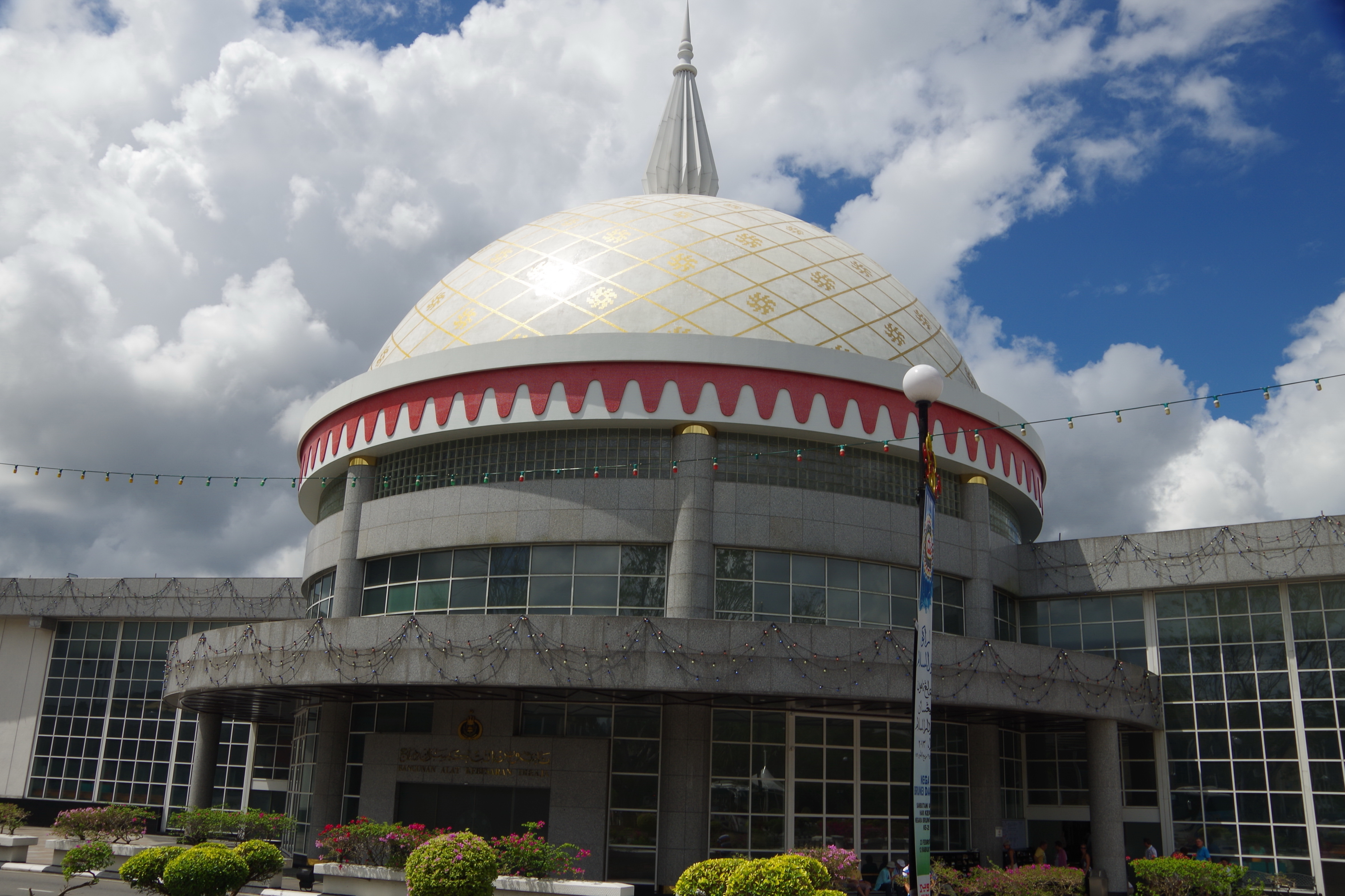 Außenansicht Royal Regalia Building